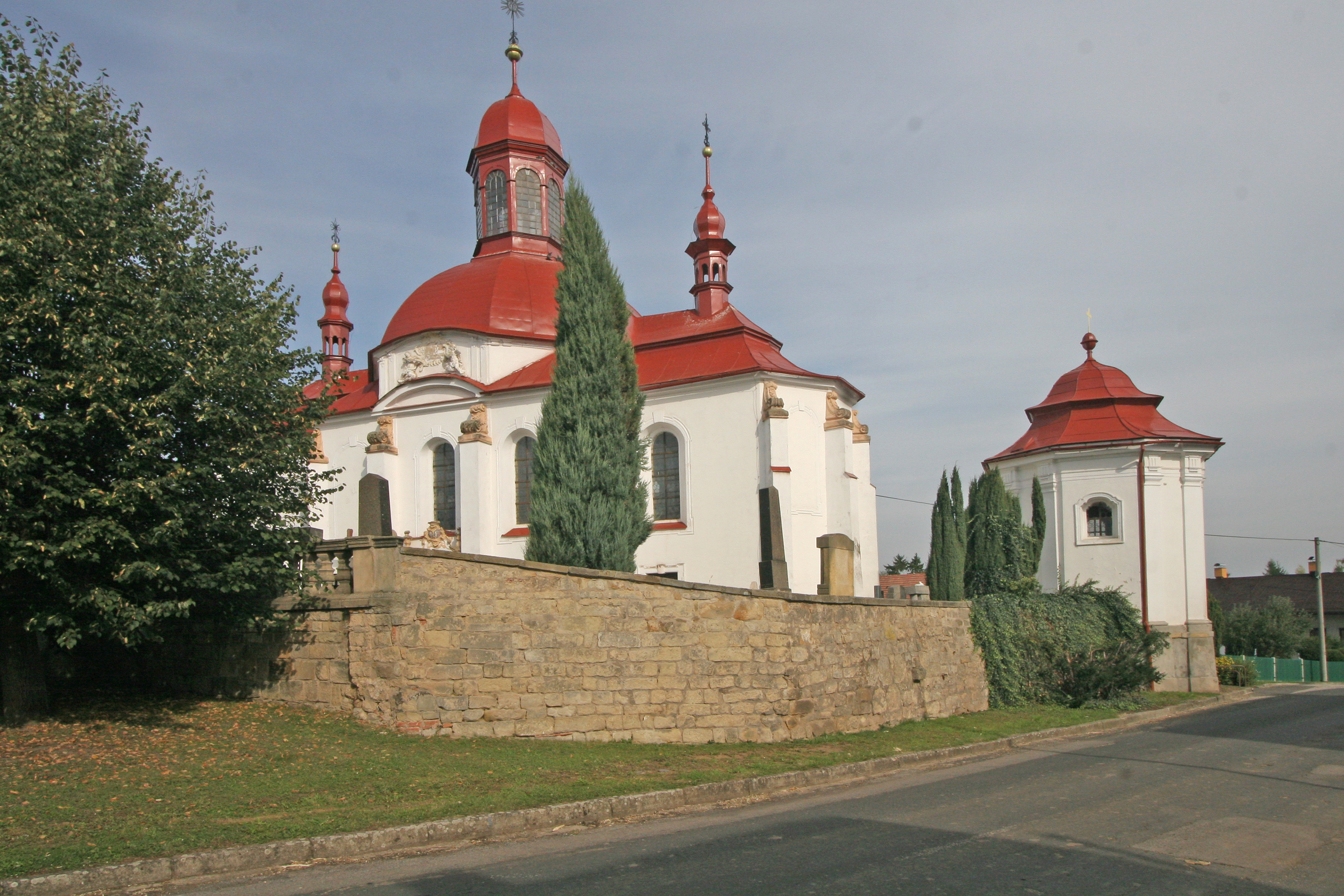 Kostel Nanebevzetí P. Marie (Slatiny), Slatiny